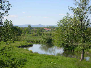 Antrechène (Territoire de Belfort) paysage avec les Vosges dans le fond Photo prise en mai 2004 par LP90 Licence GFDL LP90 mai 2004